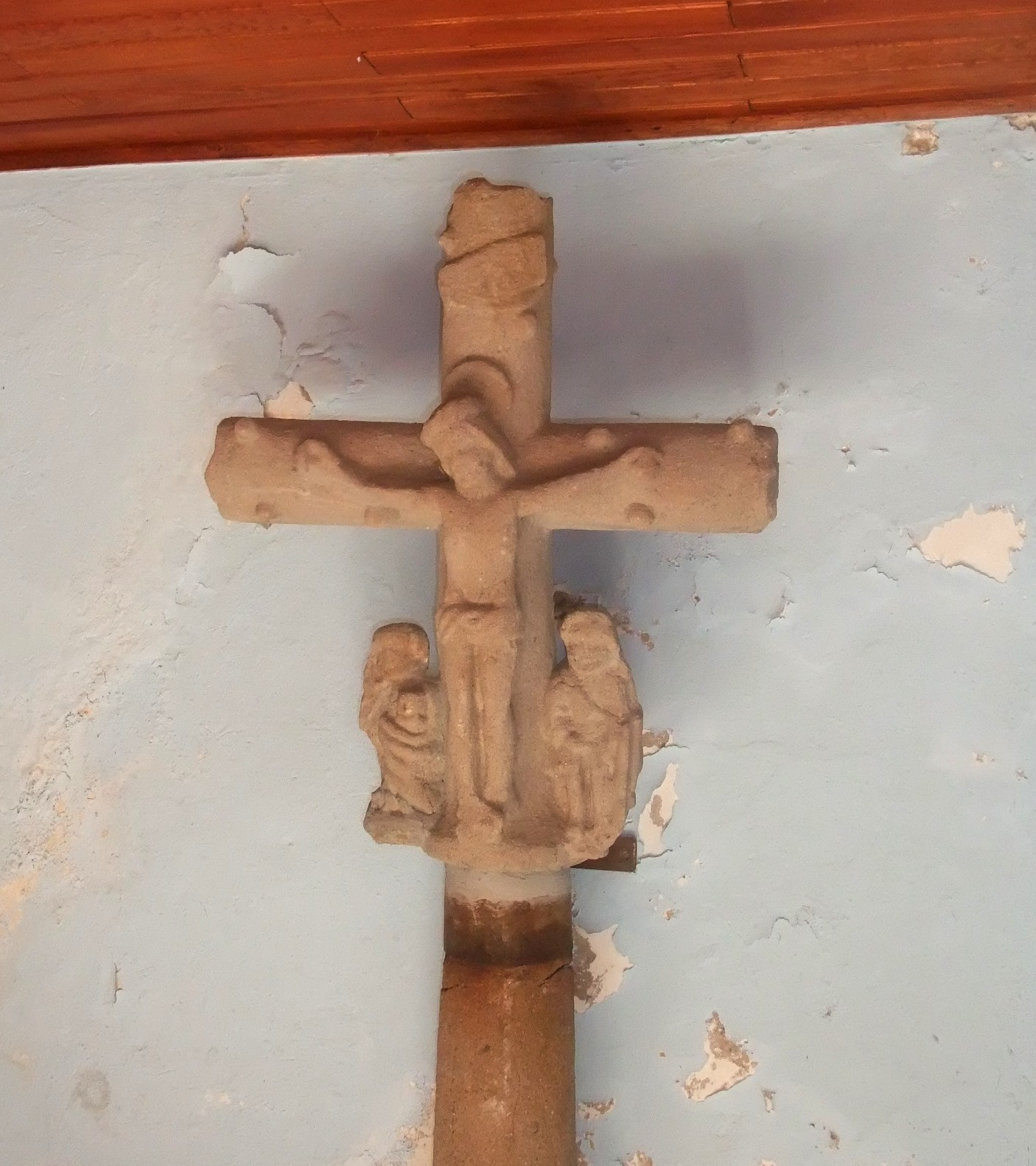 Monestier (Ardèche) vieille croix